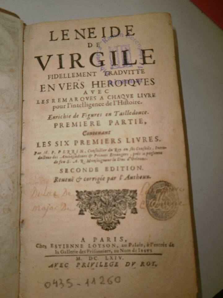 L'Eneide de Virgile-1664